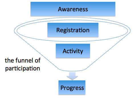 Der "funnel of participation" zur Konzeptualisierung des stetigen Drop-Outs in MOOCs nach Doug Clow.